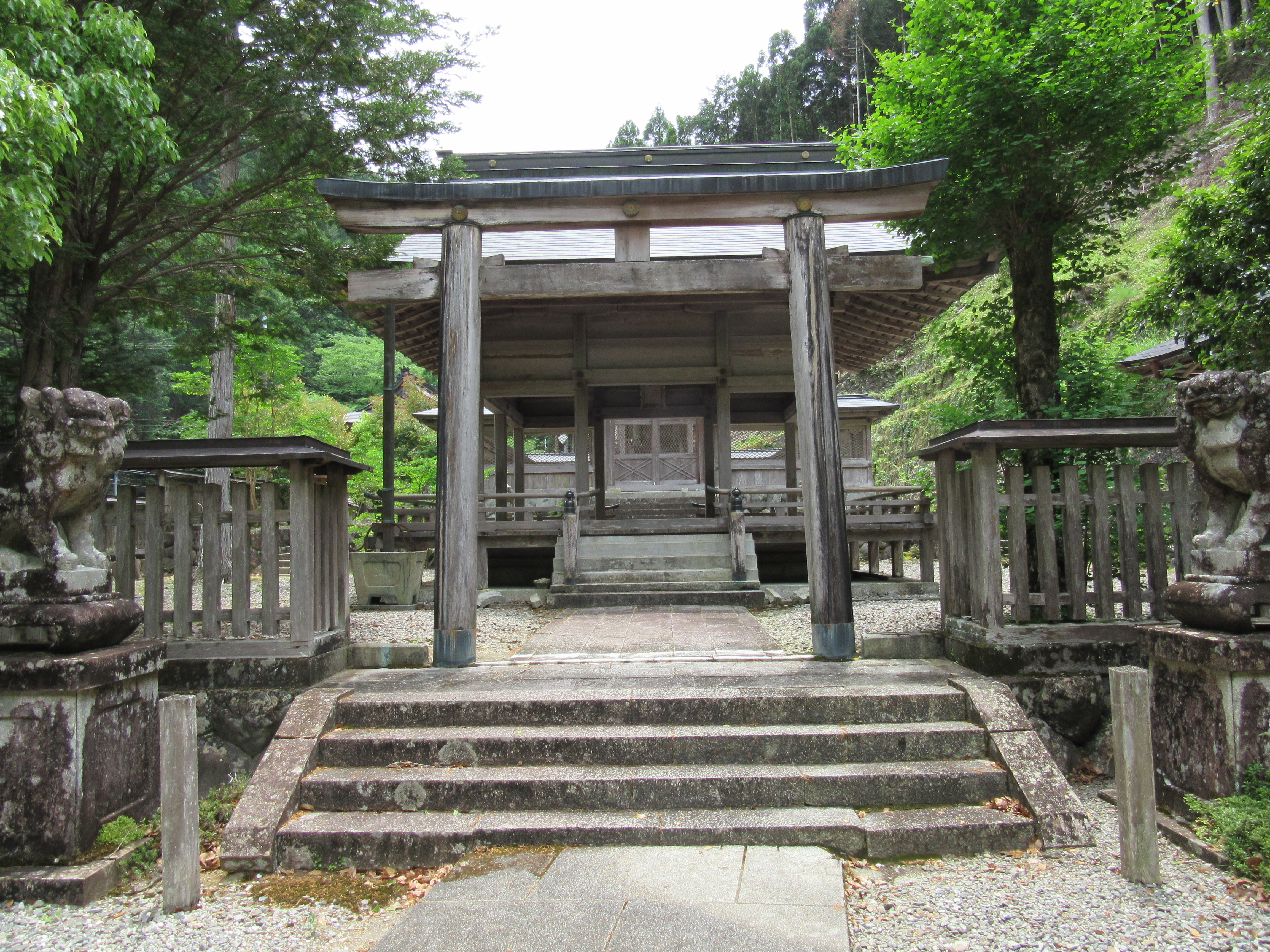 上北山村小橡・北山宮